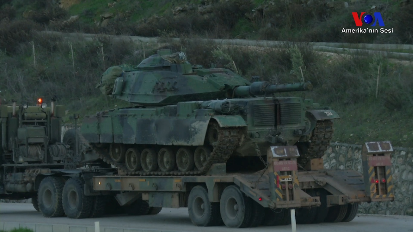 “Zeytin Dalı Harekatı" Afrin’deki hedefleri bombalanmasıyla başladı. Hatay’ın Reyhanlı ve Kırıkhan ilçeleri arasındaki sınır hattında 2. Ordu Komutanlığına bağlı birliklerden gelen çok sayıda tank ve zırhlı araç ikinci bir emre kadar yol boyunca bekletiliyor.